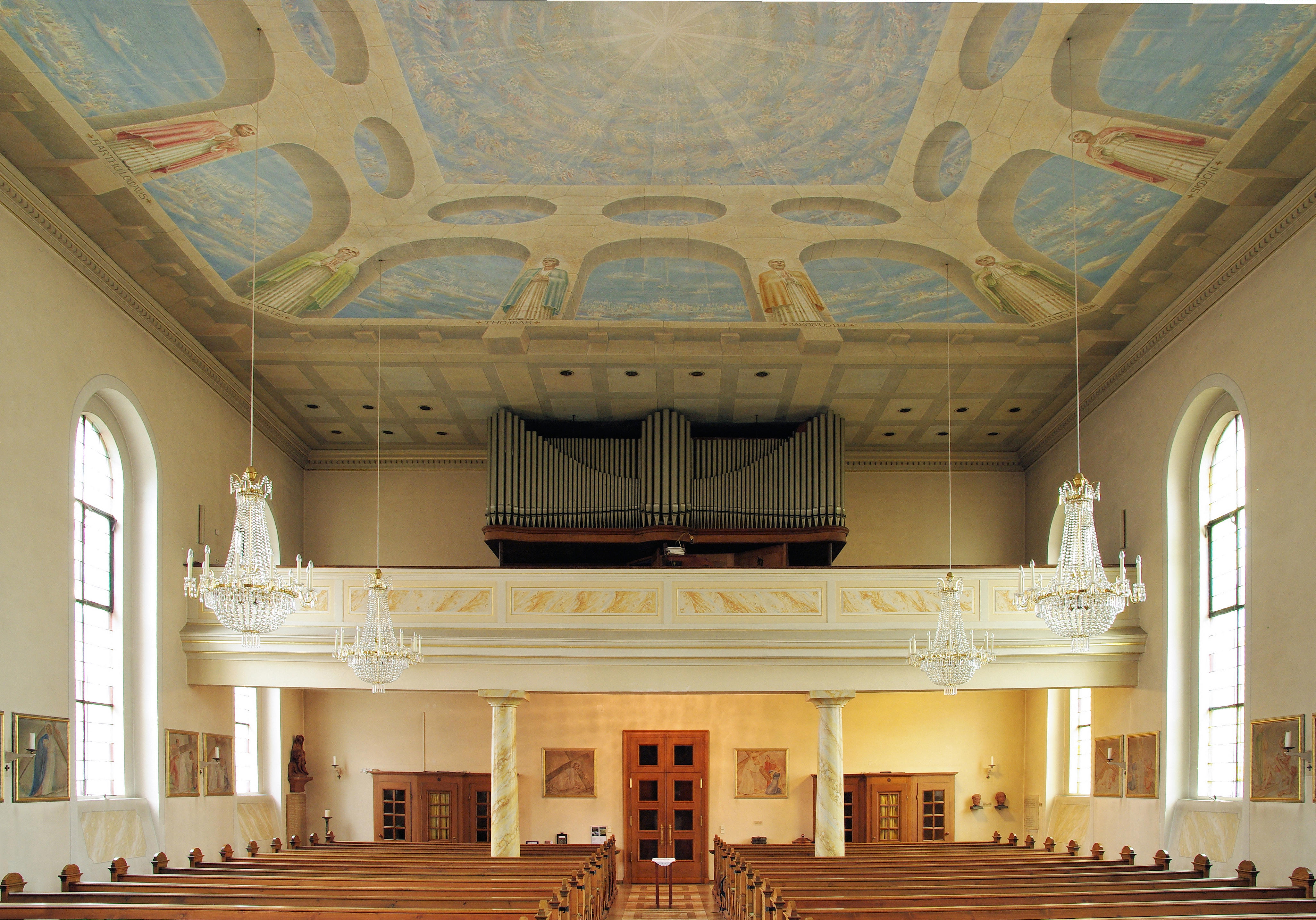 Blick vom Altar in die Kirche mit der gemalten Decke und der alten Orgel